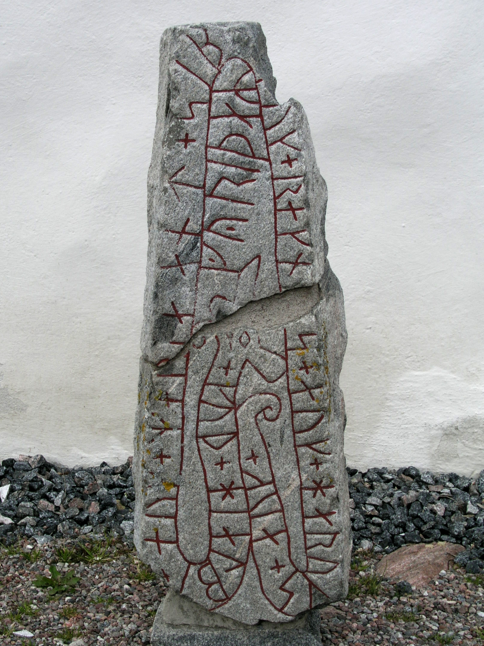 Husby-Sjuhundra kyrka, Norrtälje kommun, Diocese of Uppsala, Sweden. U558